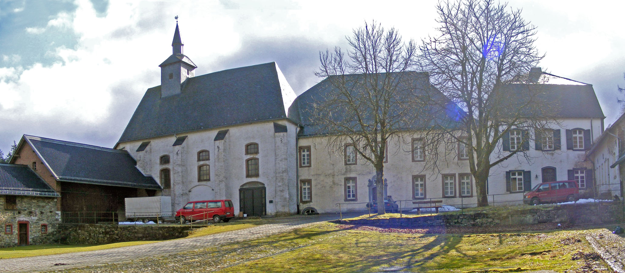 Kloster Reichenstein, Monschau, Eifel, Panorama des Innenhofs mit Weitwinkel Hauptgebäude